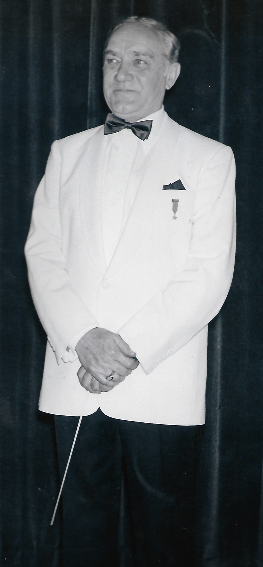 Director musical de la Banda Sinfónica FACH Arthur Max Rosin